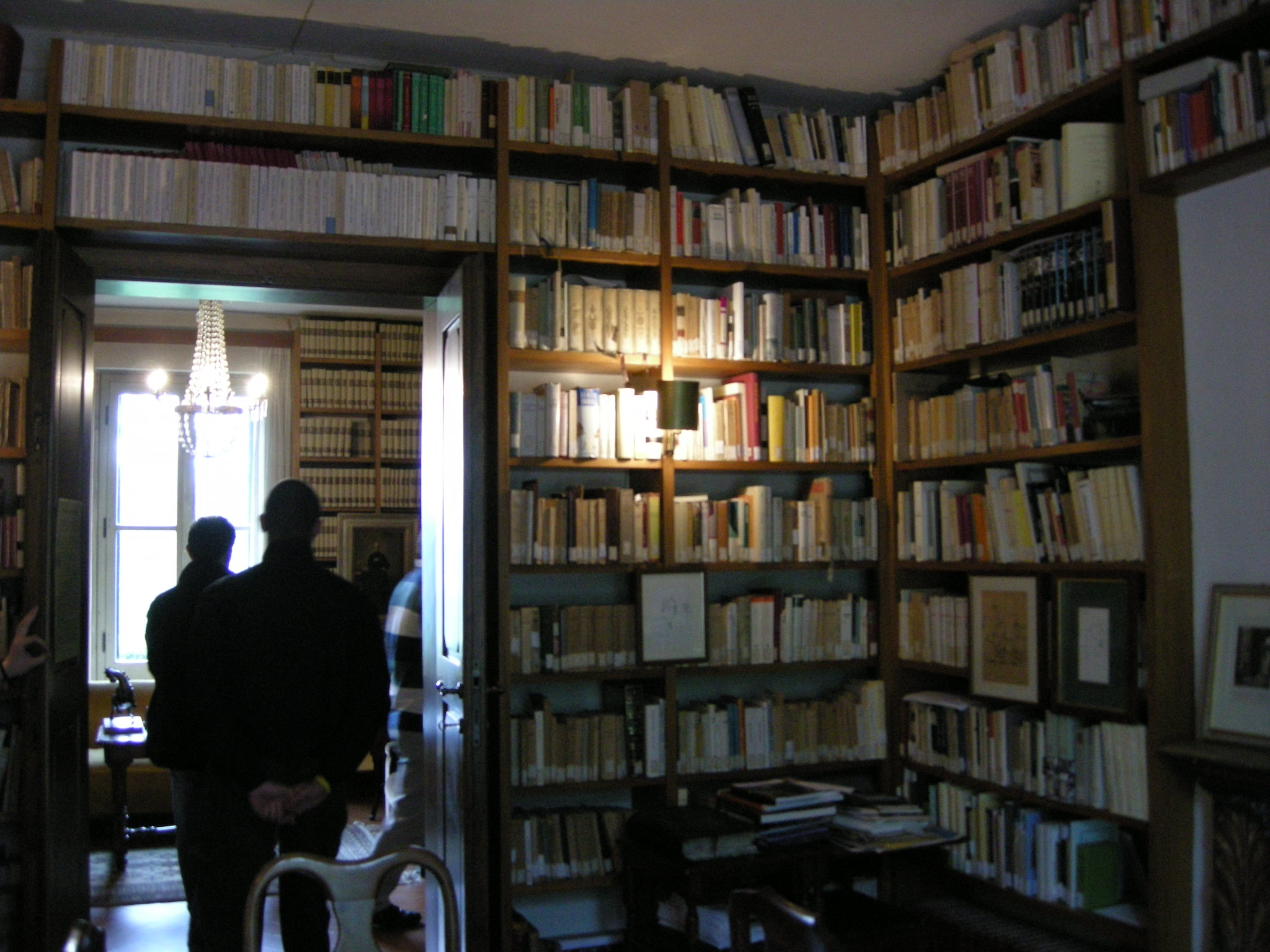 Piano terra, biblioteca